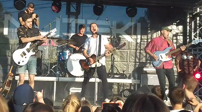 Nuteki на концерте в Оренбурге